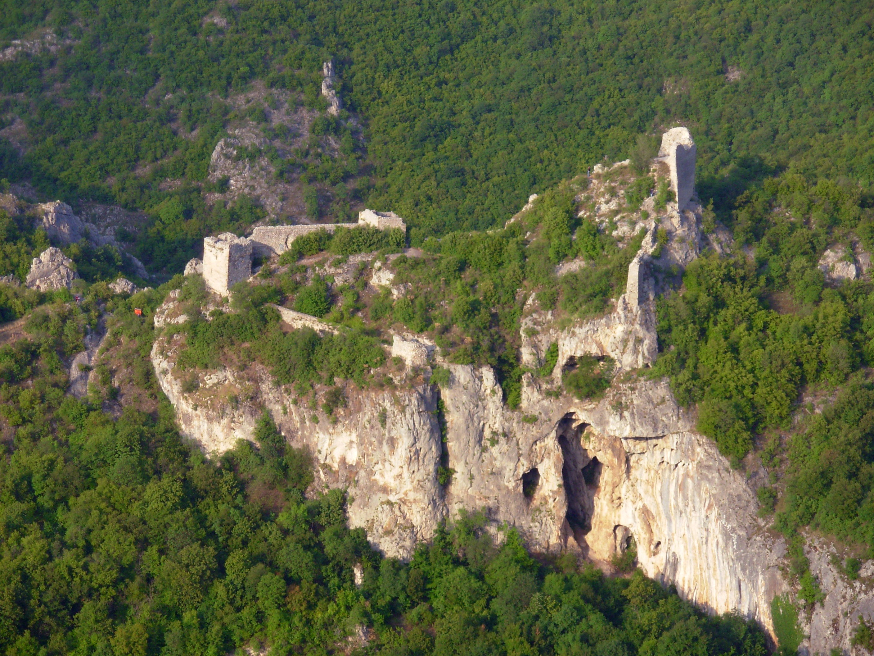 Поглед на Сокоград са Озрена. Сокоград је средњевековно утврђење надомак Сокобање.